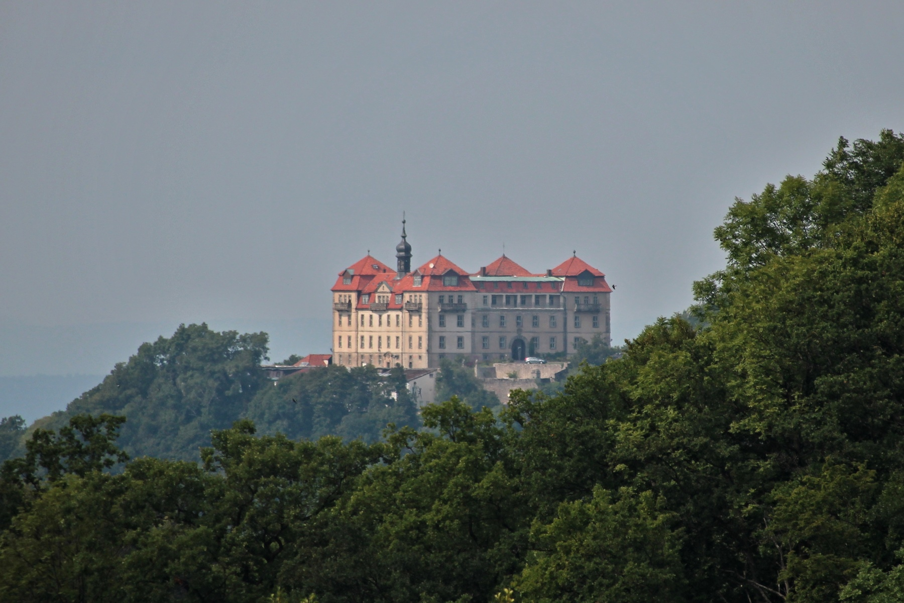 Schloss Bieberstein (Hofbieber/Hessen) von der Milseburg aus gesehen